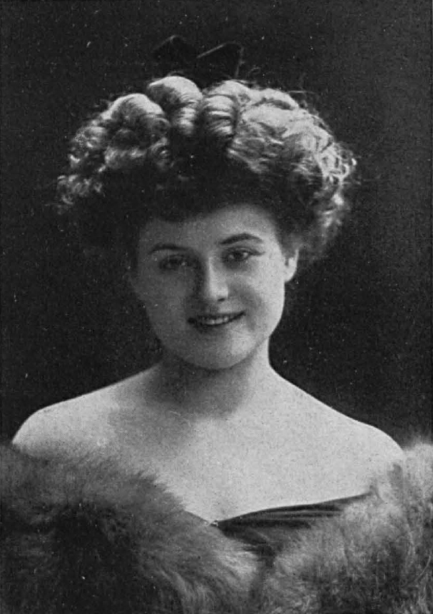 Emily „Emmy“ Wehlen (1887-1977 nach anderen Quellen 1997), deutsche Operettensängerin und Schauspielerin.